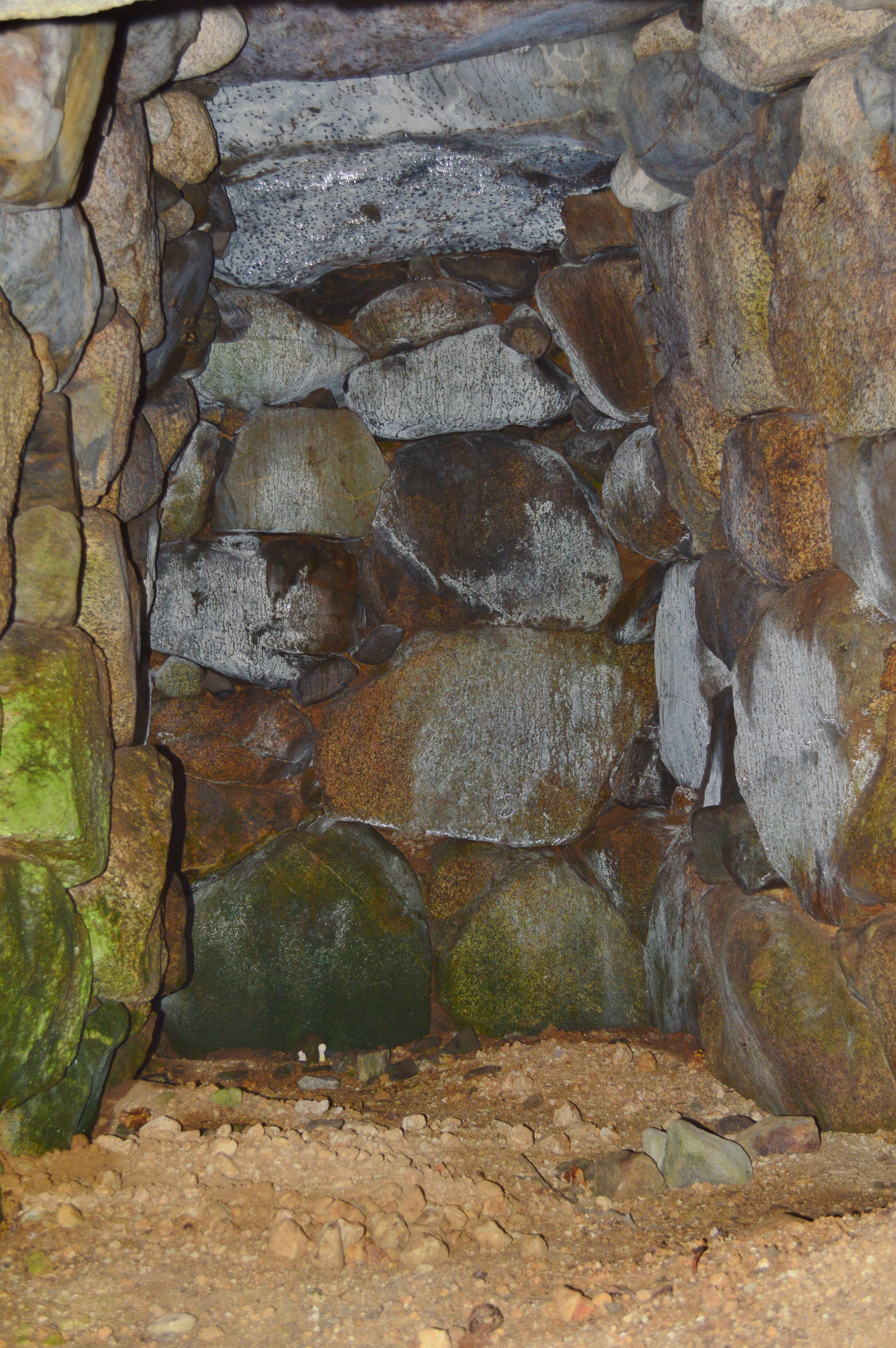 大名塚古墳 石室玄室